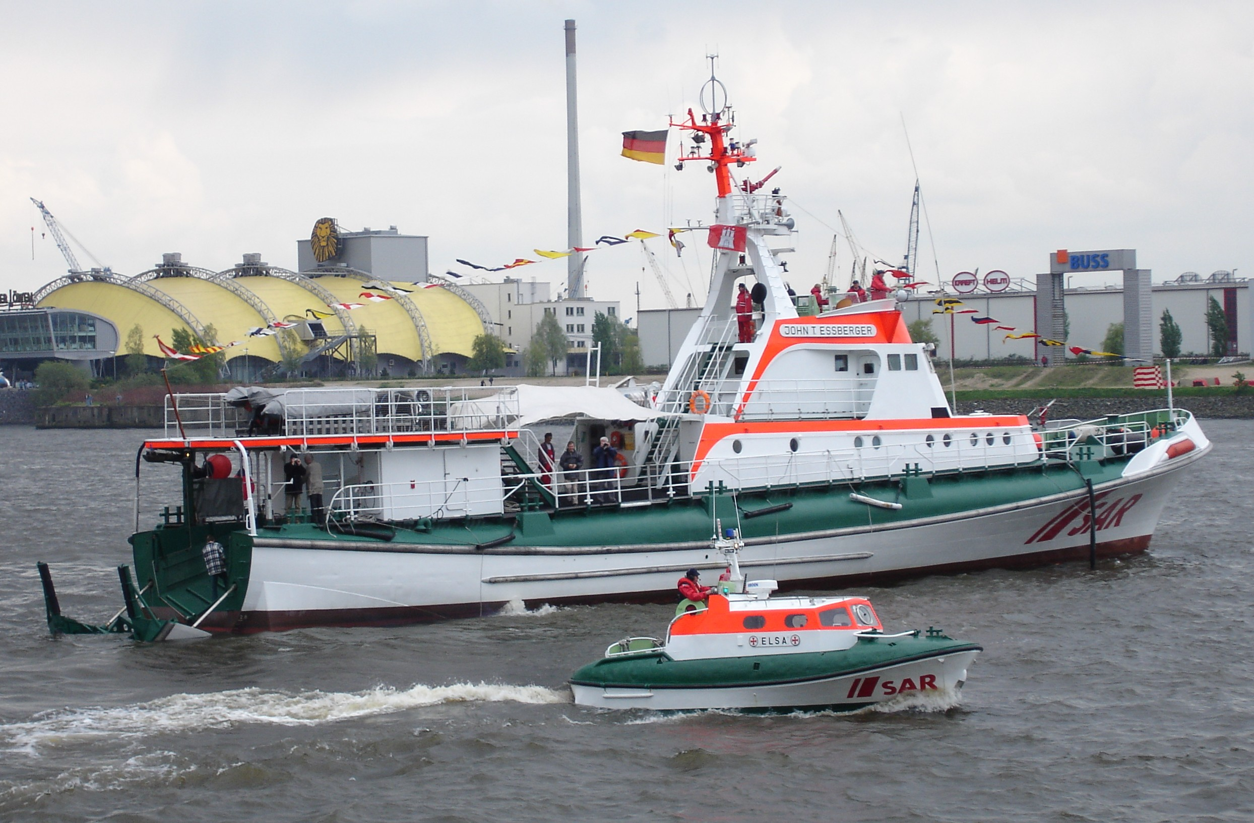 John T. Essberger mit Tochterboot im Hamburger Hafen, 7.5.2005.